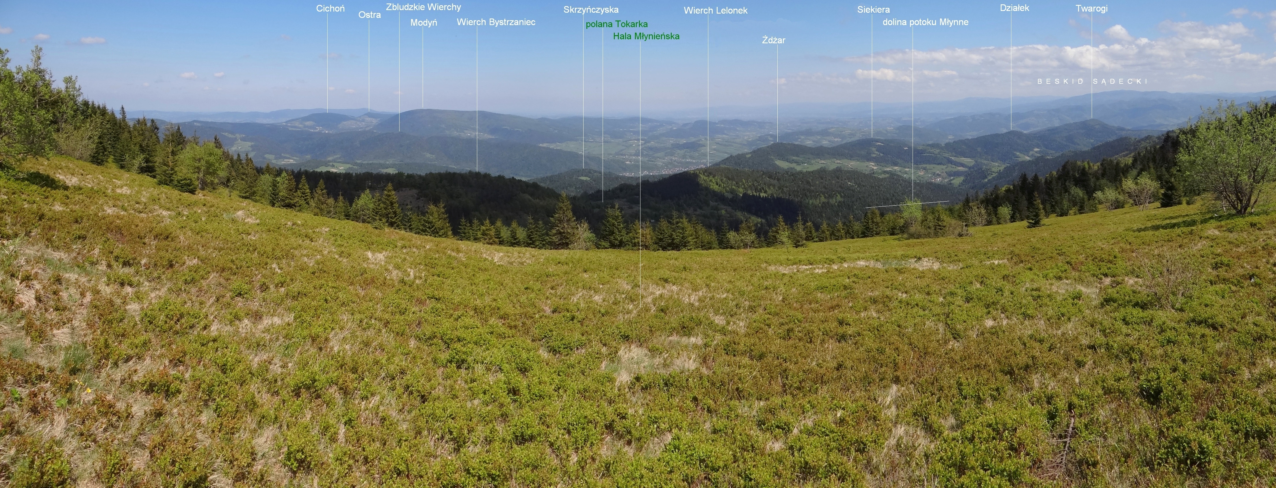 Widok z Hali Młynieńskiej